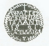 Η σφραγίδα των επαναστατημένων κατοίκων του Ταλαντίου - Αταλάντης